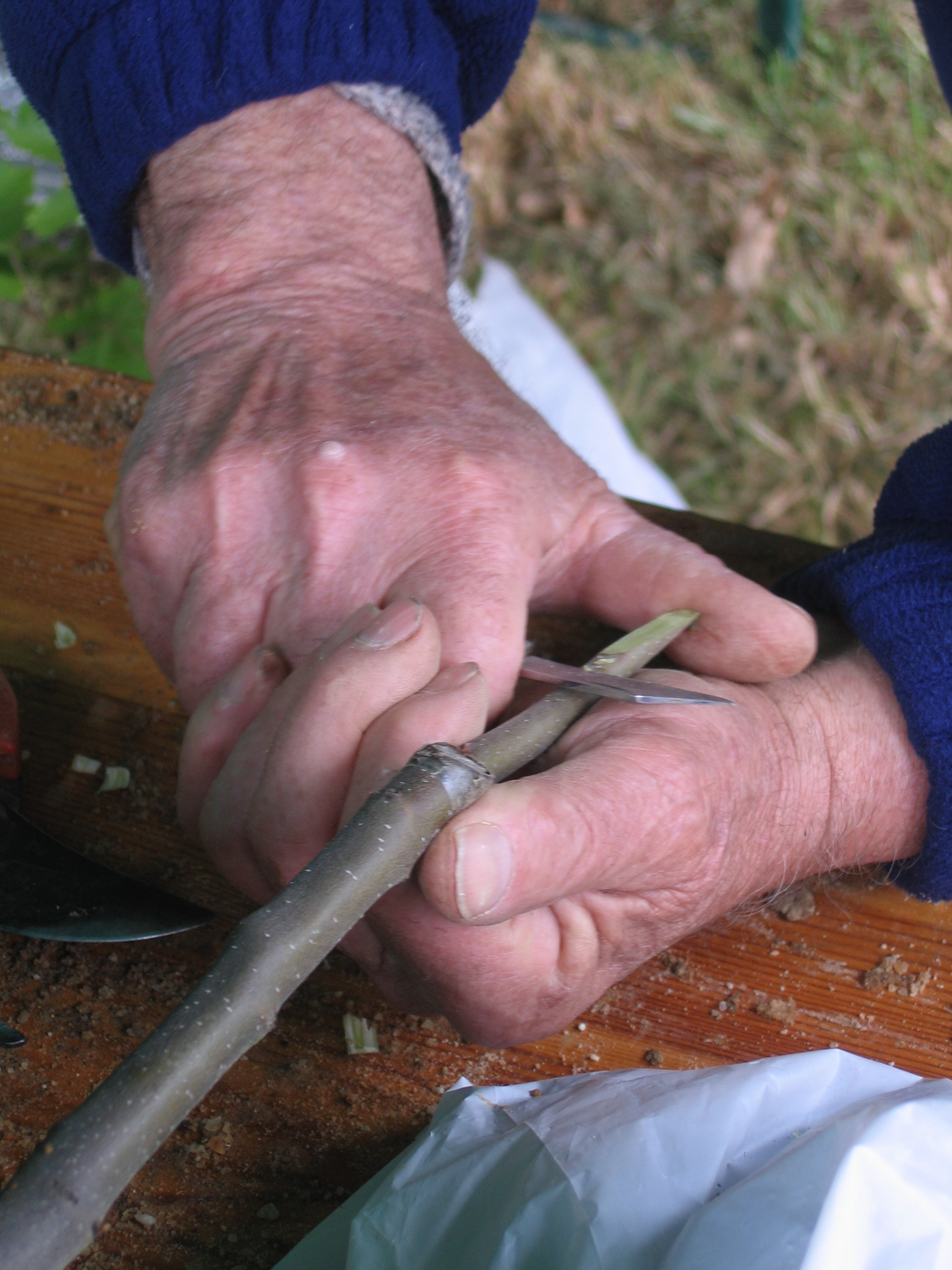 Bisotage du porte greffe (châtaignier). Dournazac - Limousin. 2019